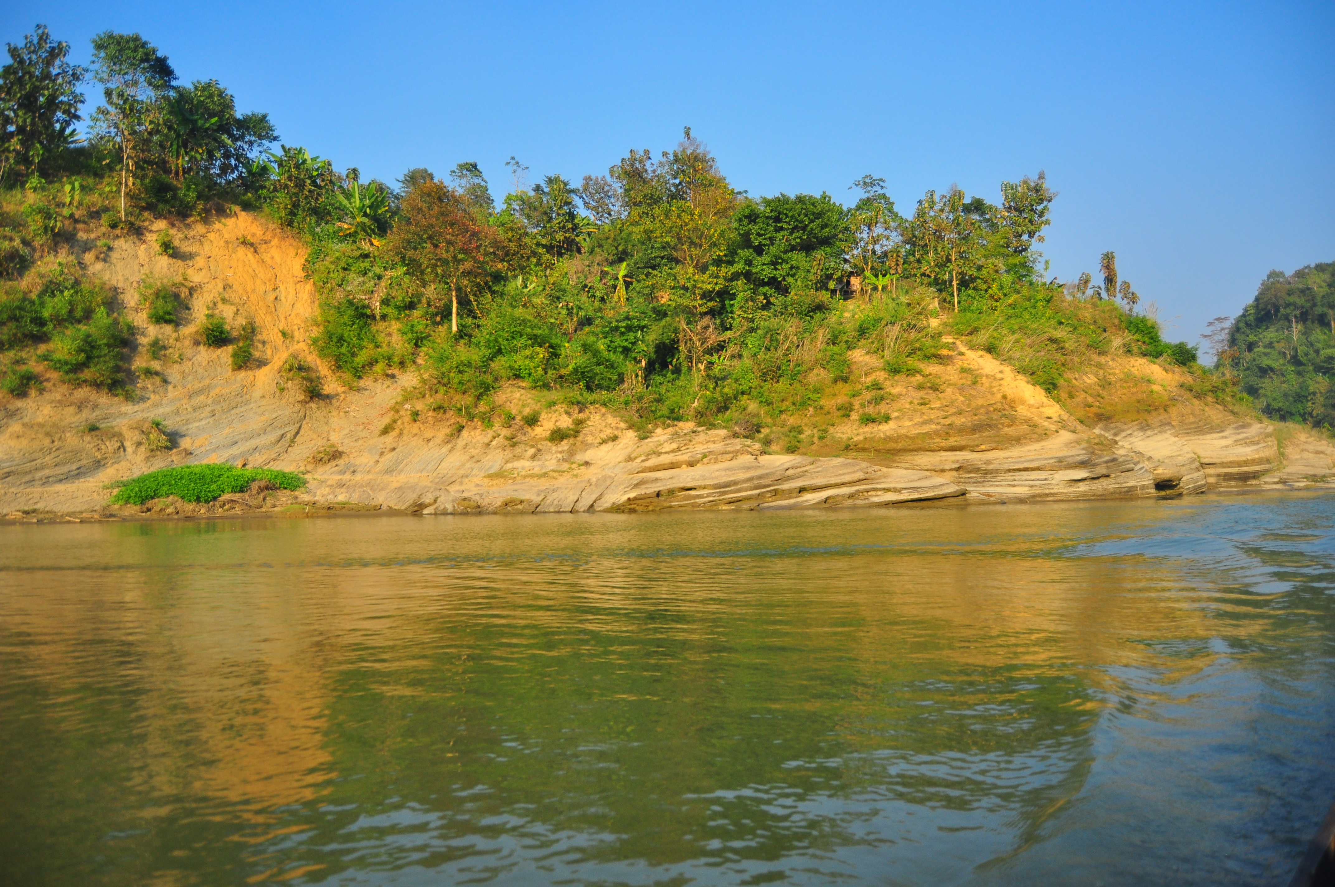 সাঙ্গু বন্যপ্রাণী অভয়ারণ্য